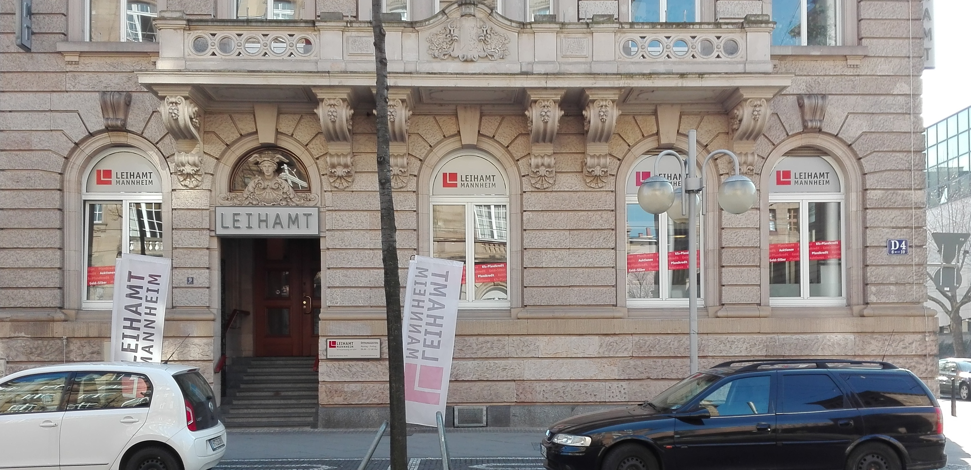 Geschäfte in der Mannheimer Innenstadt